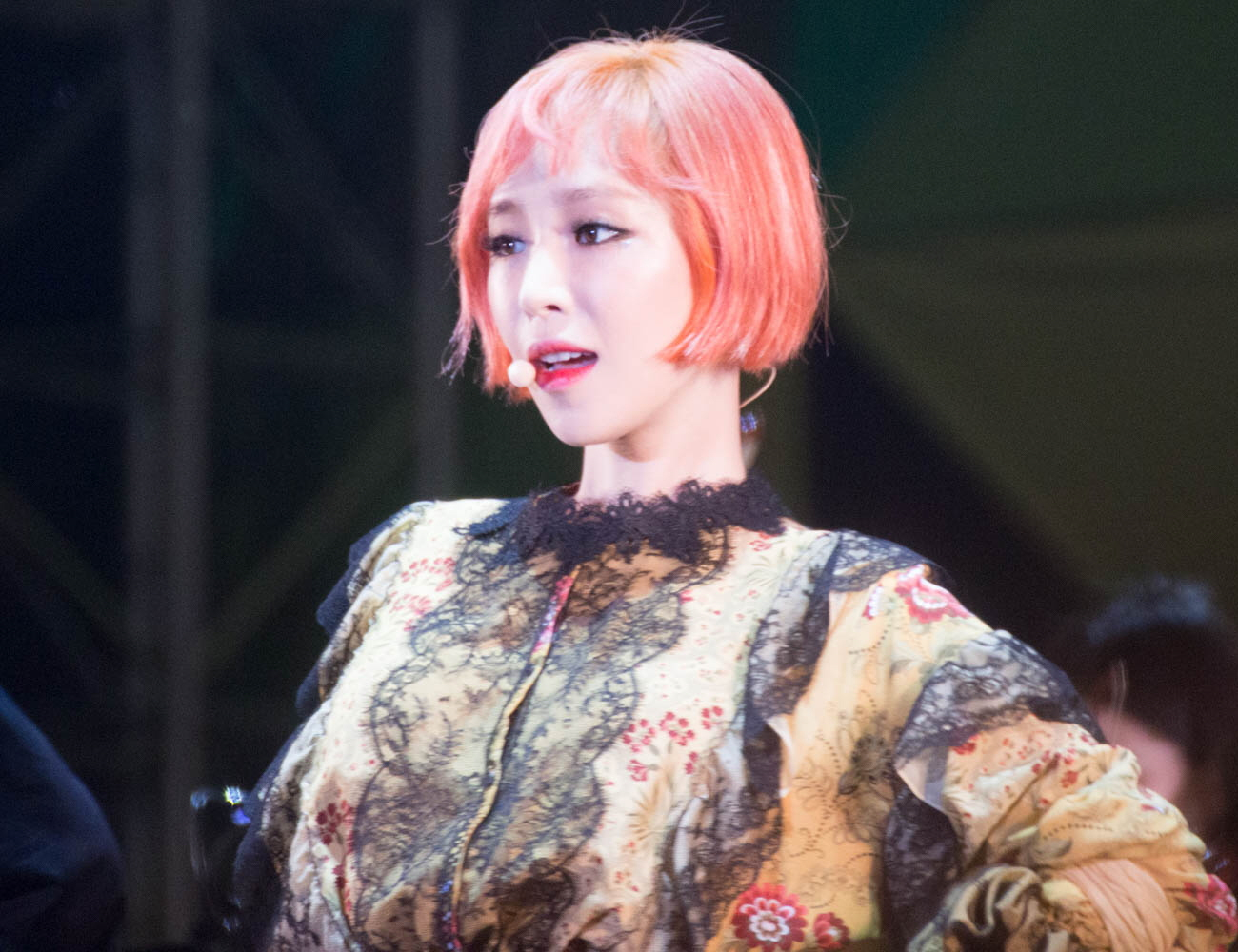 (2016.09.11)멜로디포레스트캠프 제아님 가인님 직찍 by곰탱유